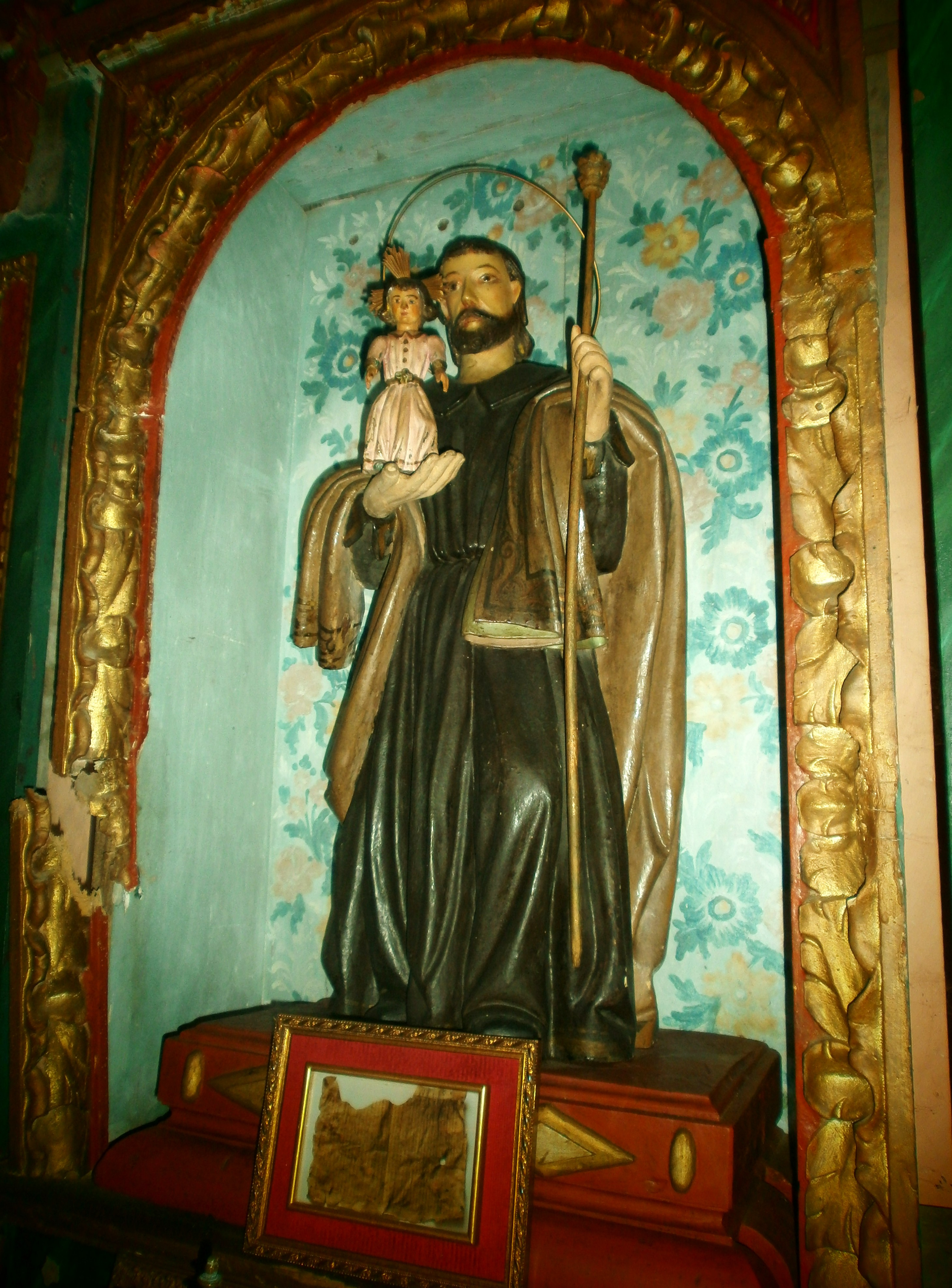 Estatua de San Jose y el Niño